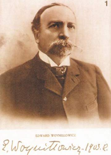 Беларуская (тарашкевіца): Партрэт Эдварда Вайніловіча (Edvard Vajniłovič)